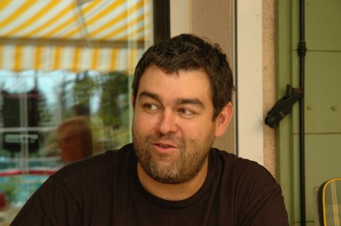 Charles Werquin